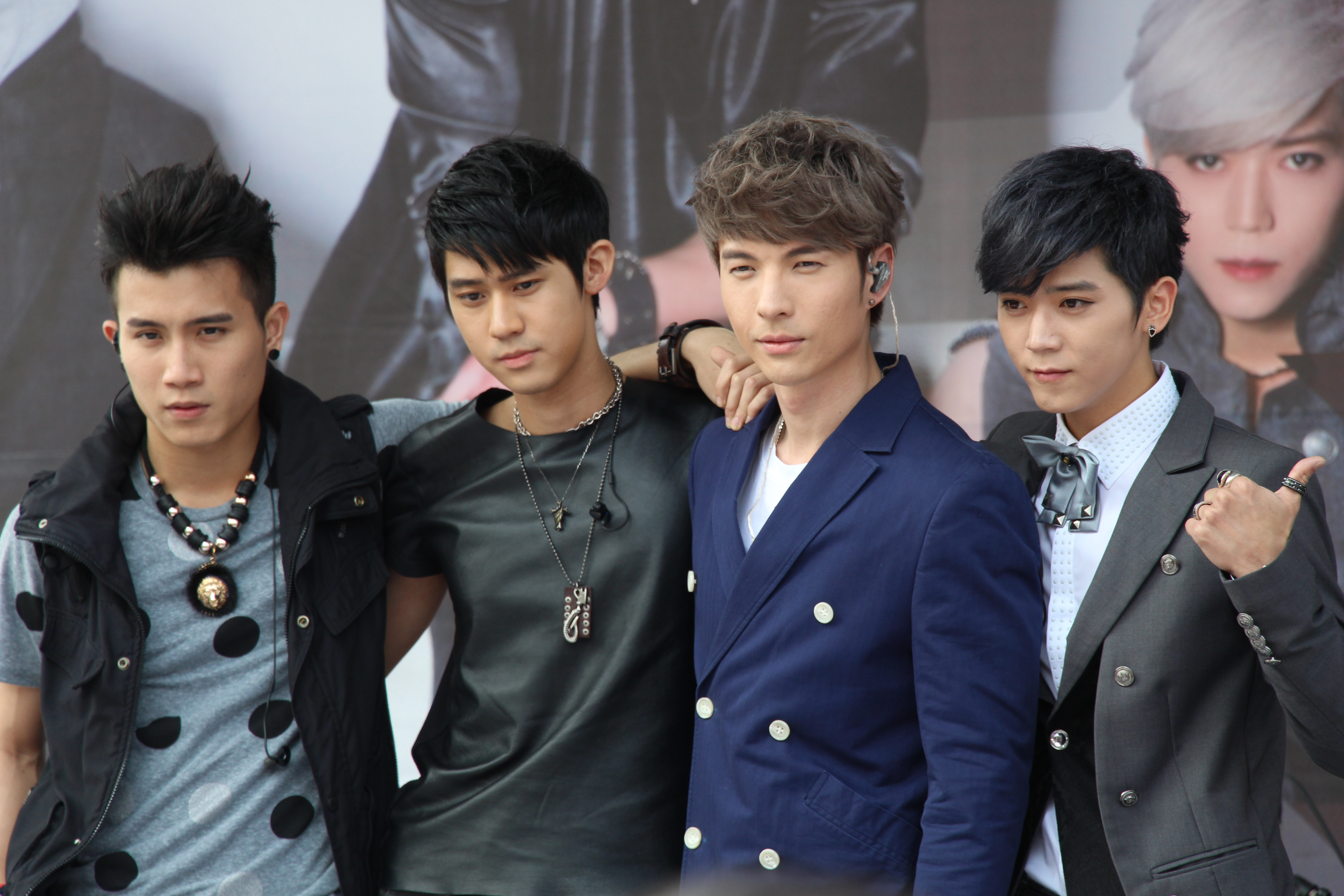 《IV 勢在必行2》華山劇場簽唱會（左起陳彥允、李玉璽、陳勢安、Bii）